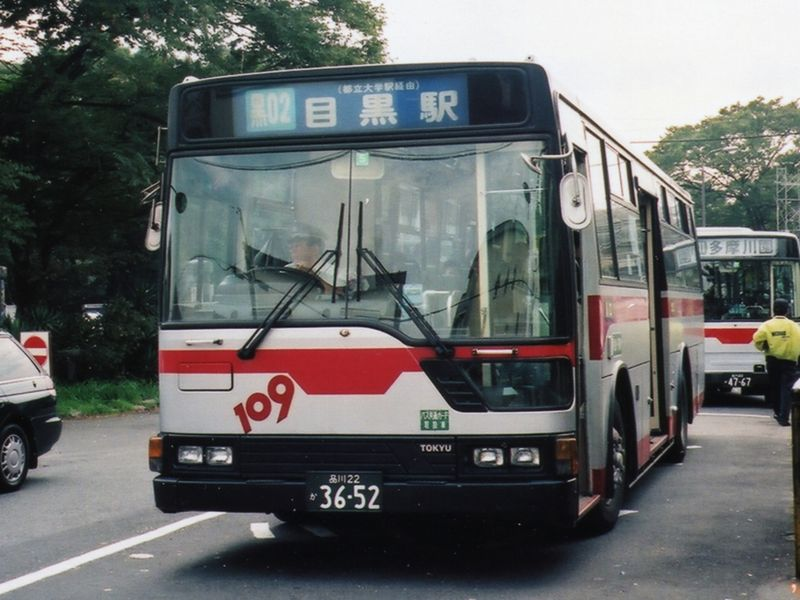 Tokyu Bus M875 "109" Mitsubishi P-MP618K at Futako Tamagawa